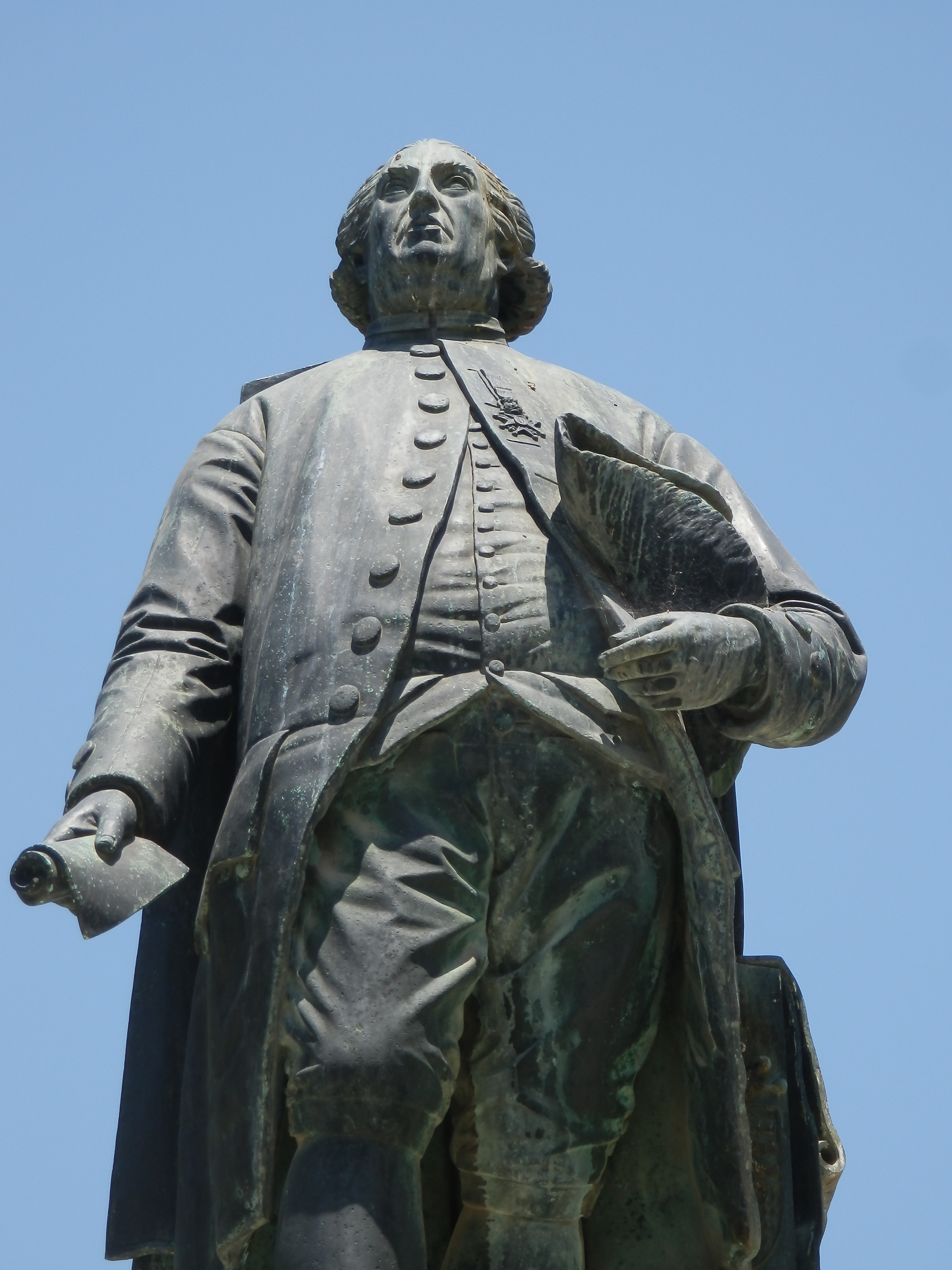 Monumento a Ramón Pignatelli situado en el Parque Pignatelli de Zaragoza, España. Escultura de Antonio Palao Marco